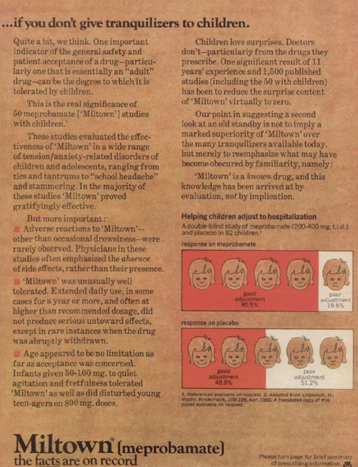 Publicité pour Miltown meprobamate